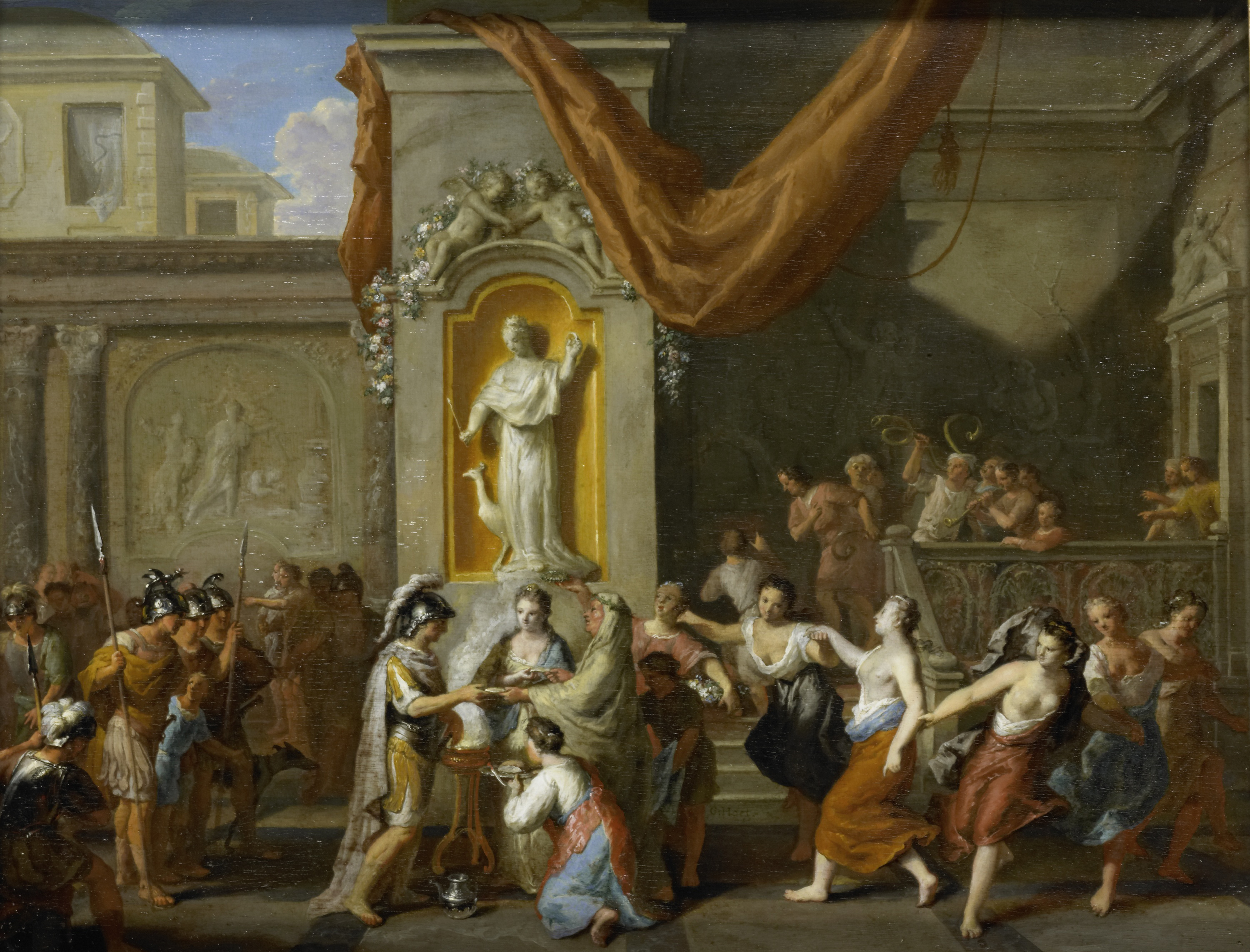 Het huwelijk van Alexander de Grote met Roxane van Bactrië. Het huwelijk wordt links op de voorgrond ingezegend door een priester bij een brandend altaar, voor een nis met een standbeeld van Juno. Links de soldaten uit het gevolg van Alexander. Rechts een groep dansende vrouwen, rechtsachter staan muzikanten op een balkon. Pendant van SK-A-162.